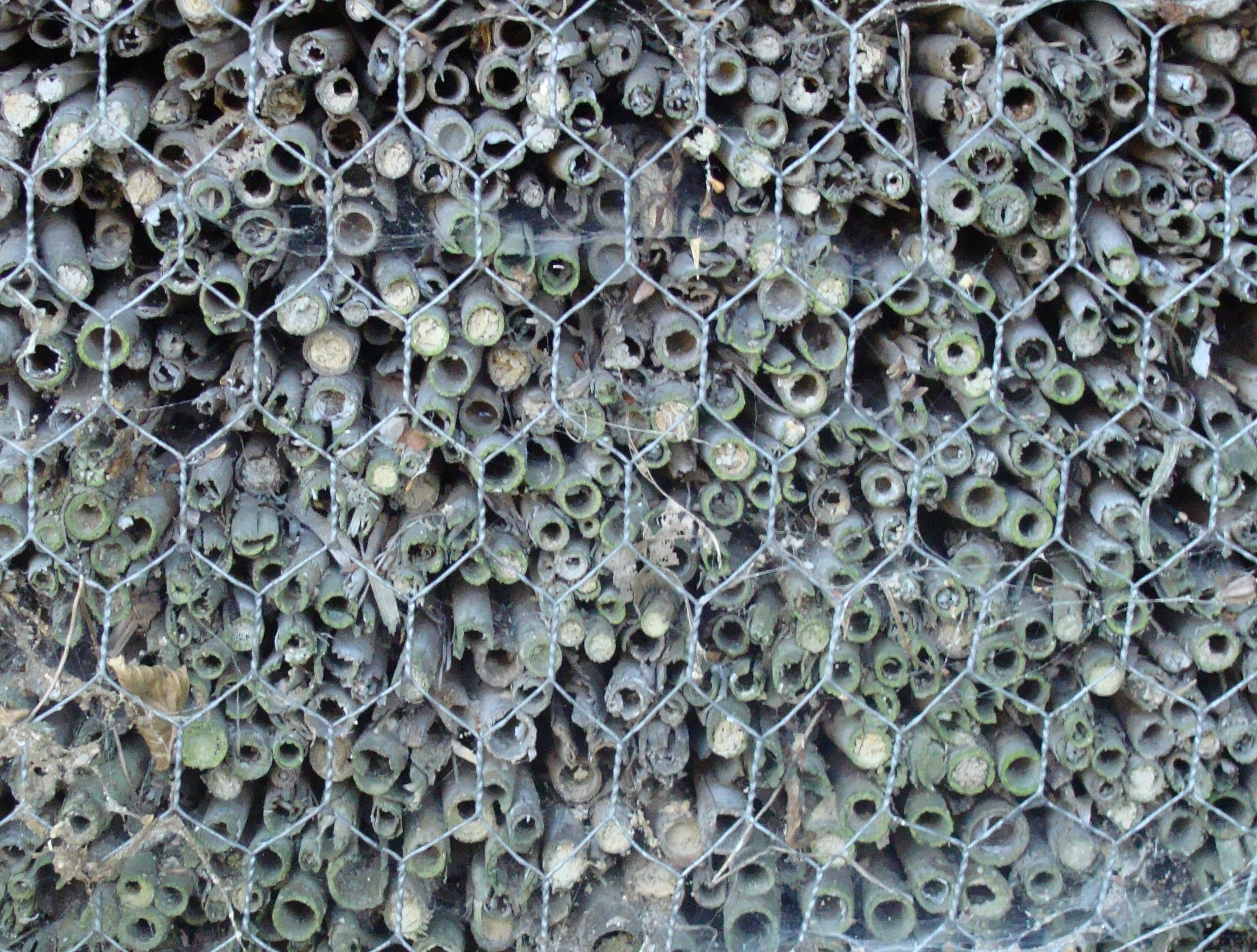 Przykład hibernakulum